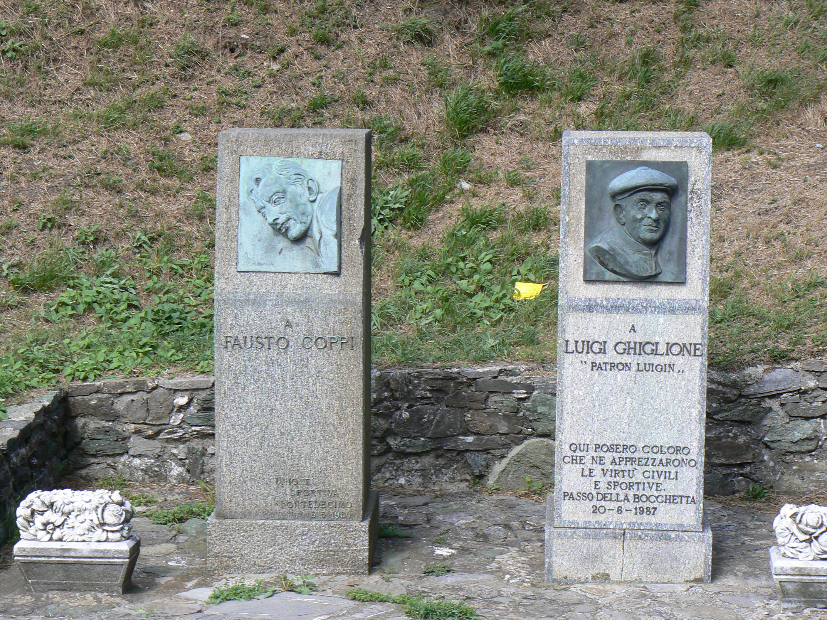 Stele commemorativa dedicata a Fausto Coppi al passo della Bocchetta